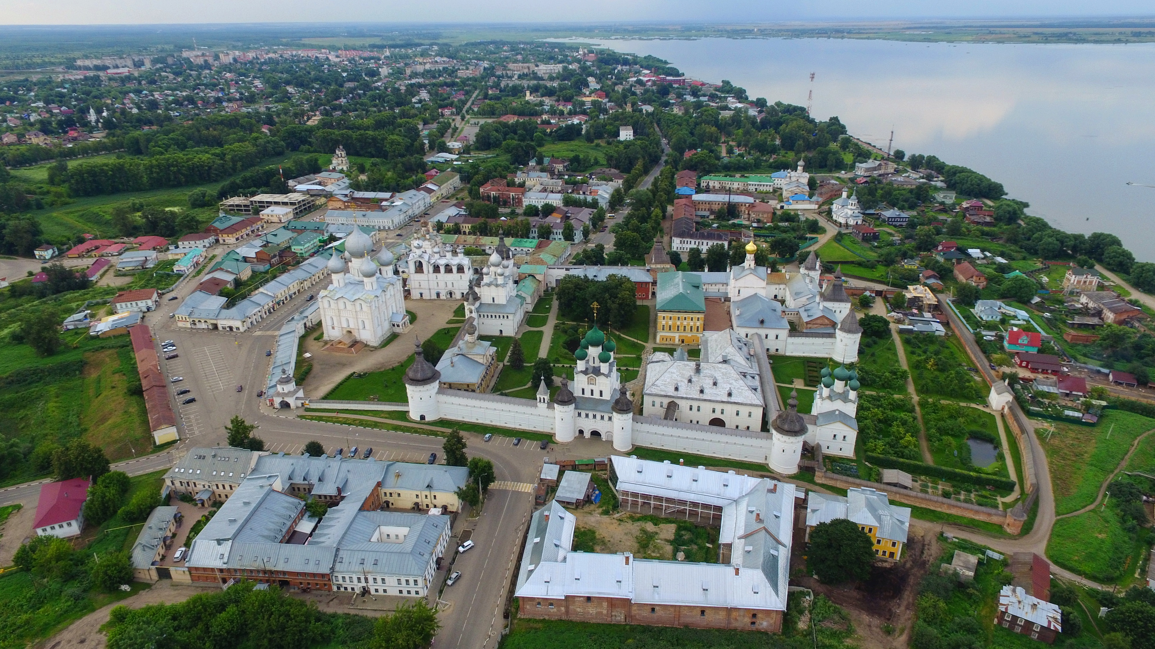 Ростовский кремль (общий вид)